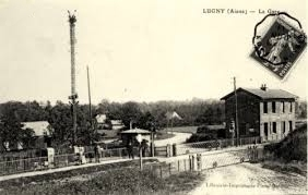 Carte postale de la gare vers 1910.